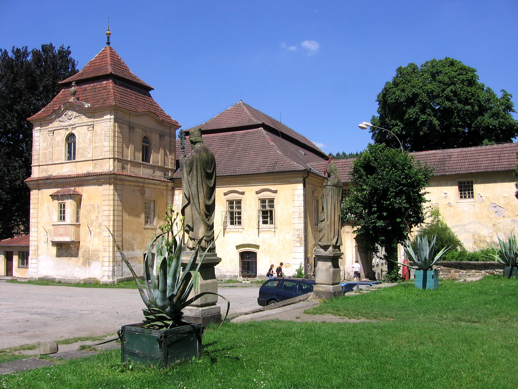 Želiv, klášter